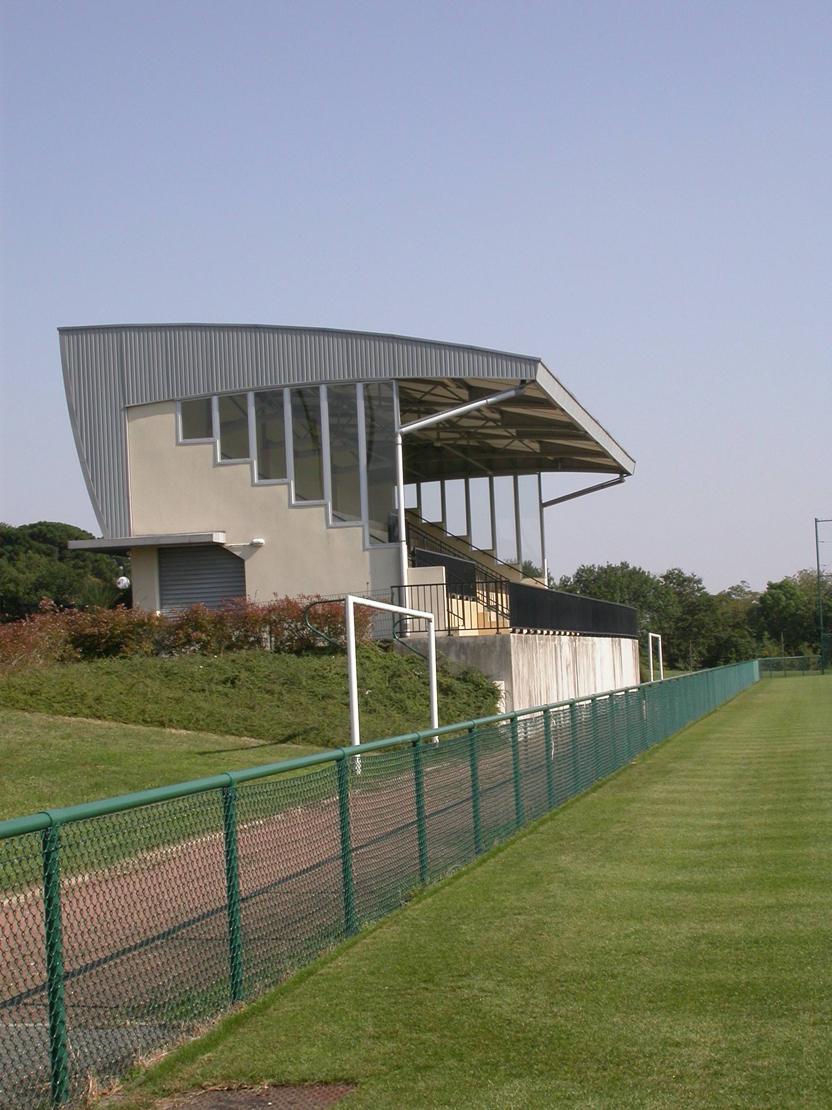 Saint6herblain Stade de football du Val de Chézine